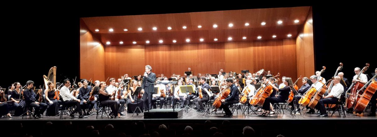 Concert du 8 septembre 2018 au Palais des Festivals de Cannes par deux orchestres mélangés, celui de Cannes Provence Côte d'Azur et celui des employés d'Enedis